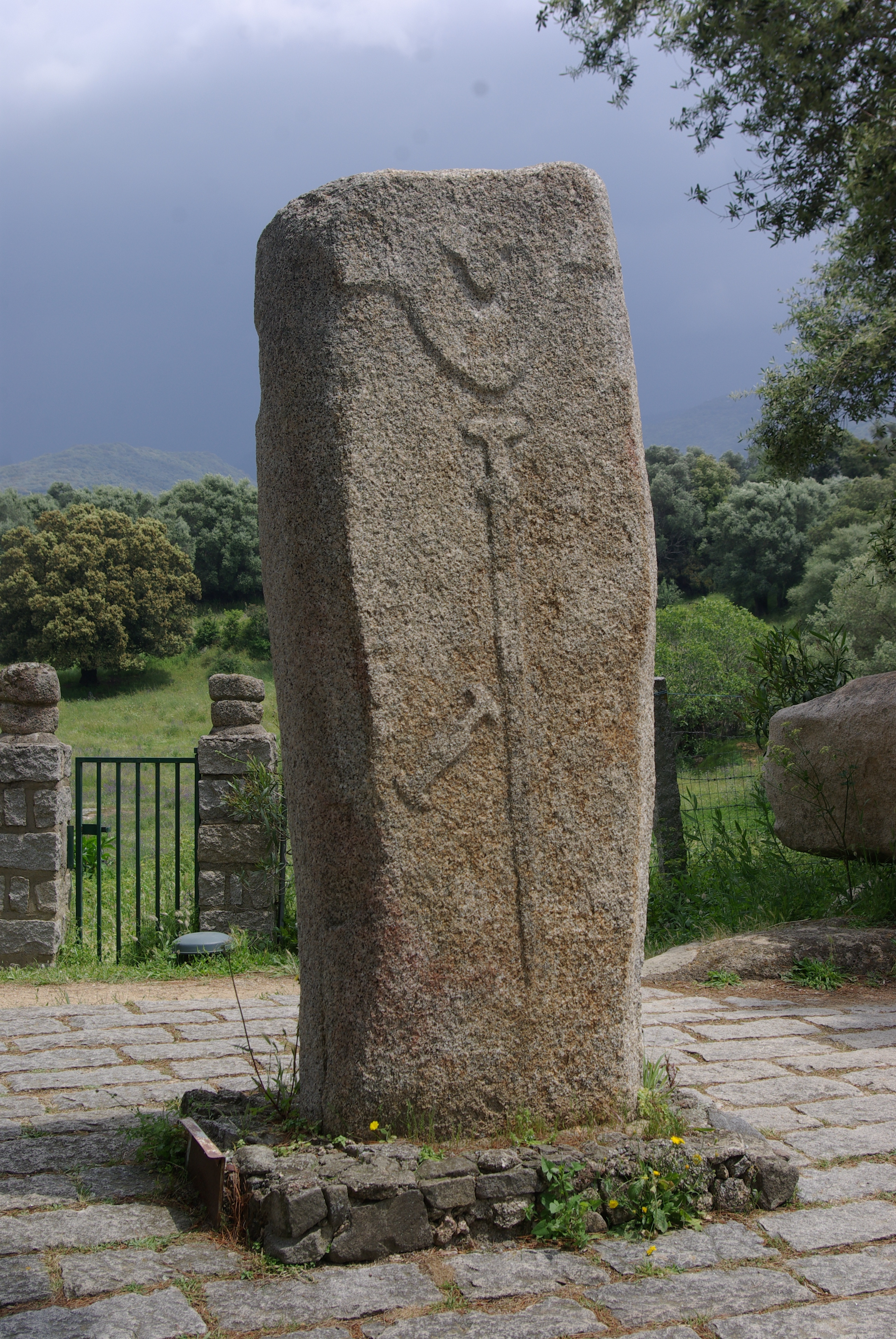 Filitosa ist ein Gebiet auf Korsika mit Menhieren. Das Bild zeigt den Menhier V.